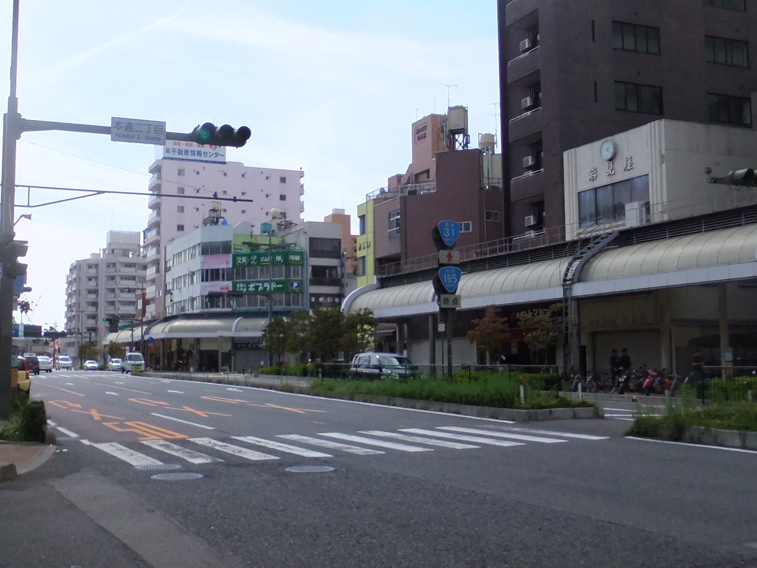 国道31・185号始点・終点